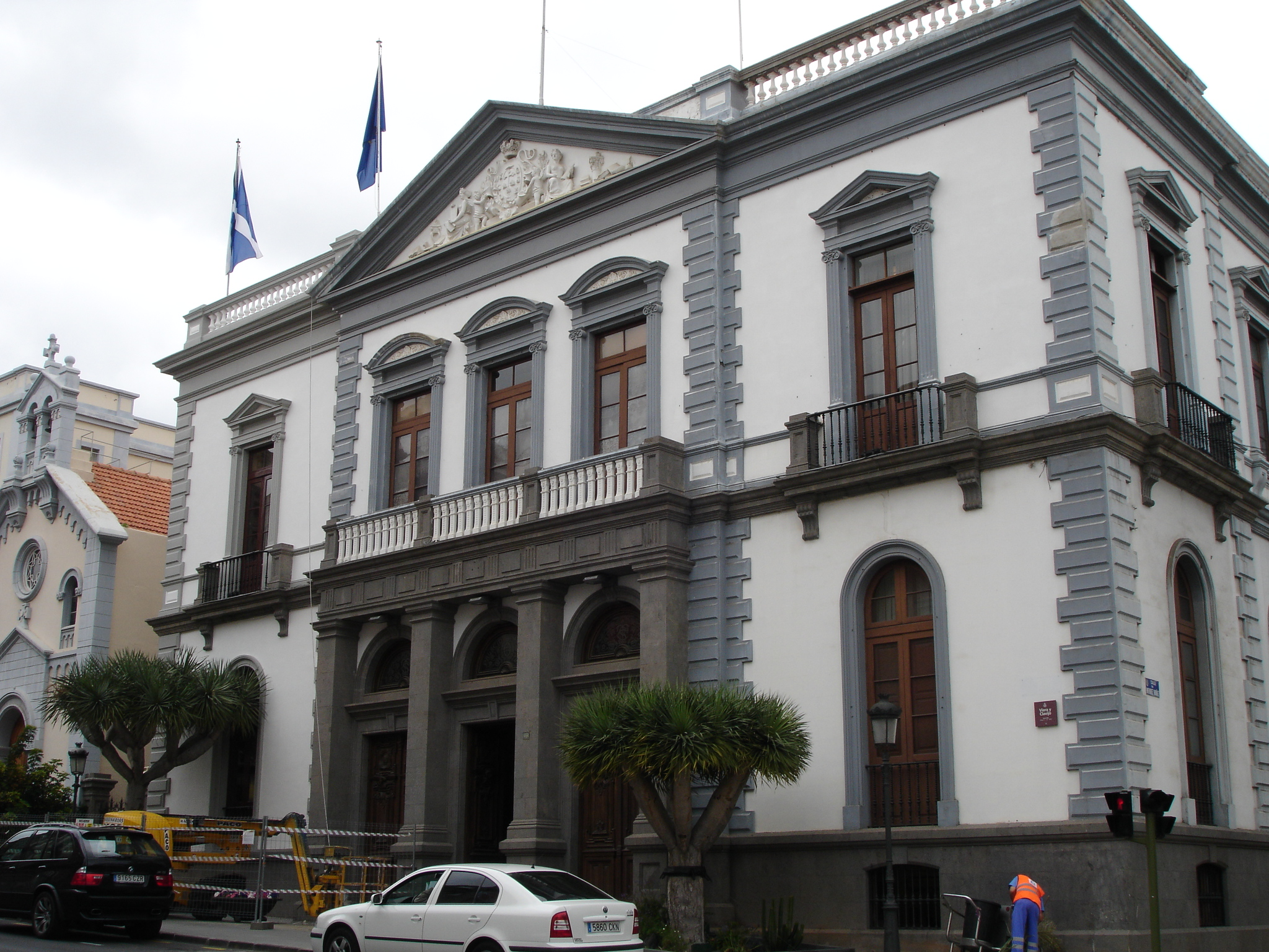 Imagen del Ayuntamiento de Santa Cruz de Tenerife (Islas Canarias). 30 de Marzo de 2007.